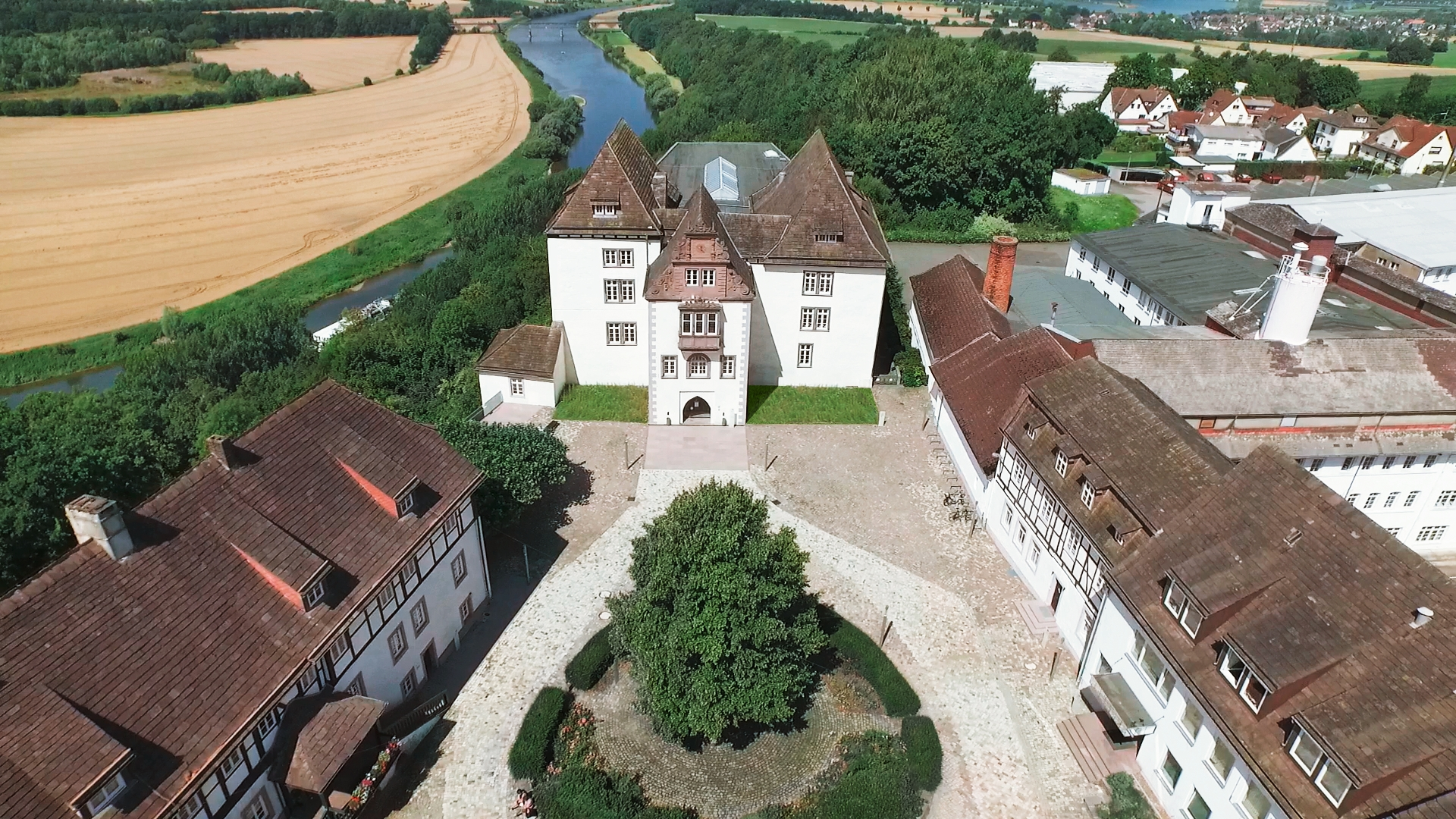 Museum Schloss Fürstenberg aus der Vogelperspektive